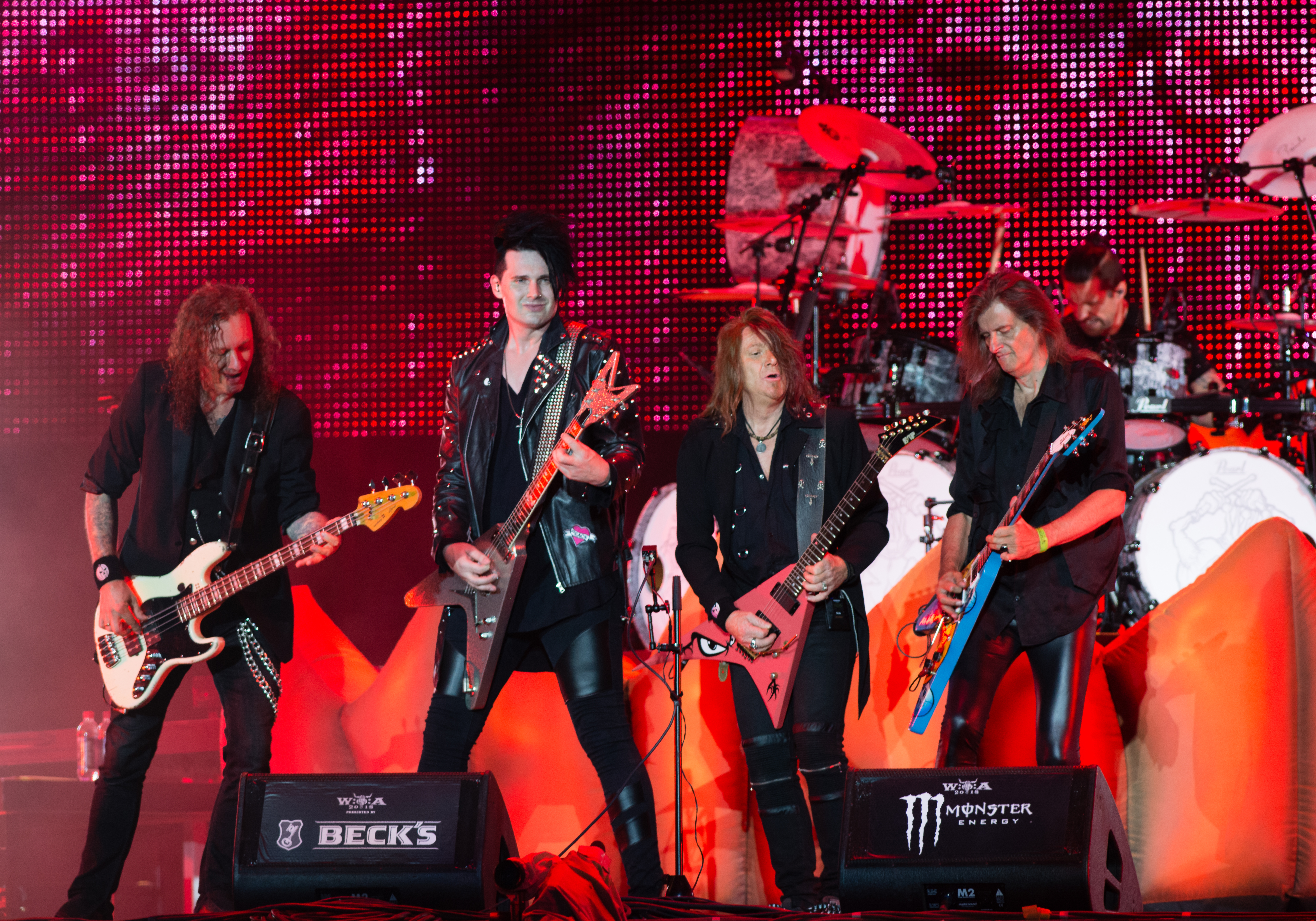 Helloween - Pumpkins United beim Wacken Open Air 2018